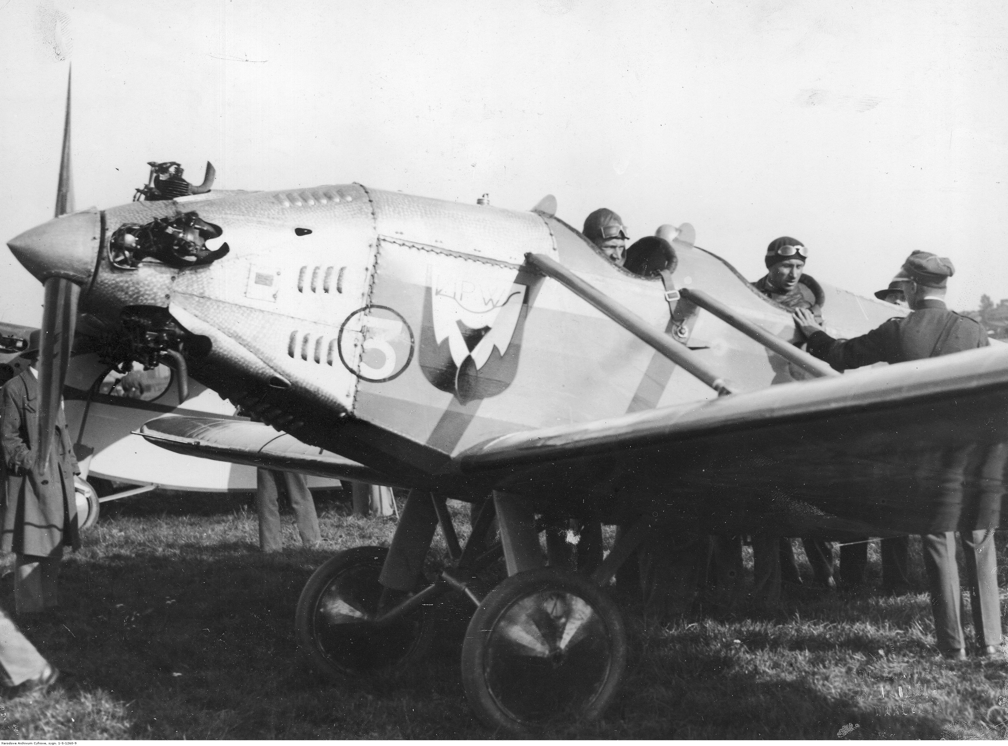 Załoga samolotu PWS-51 z pilotem K. Stefaniukiem podczas III Krajowego Konkursu Awionetek w Warszawie.